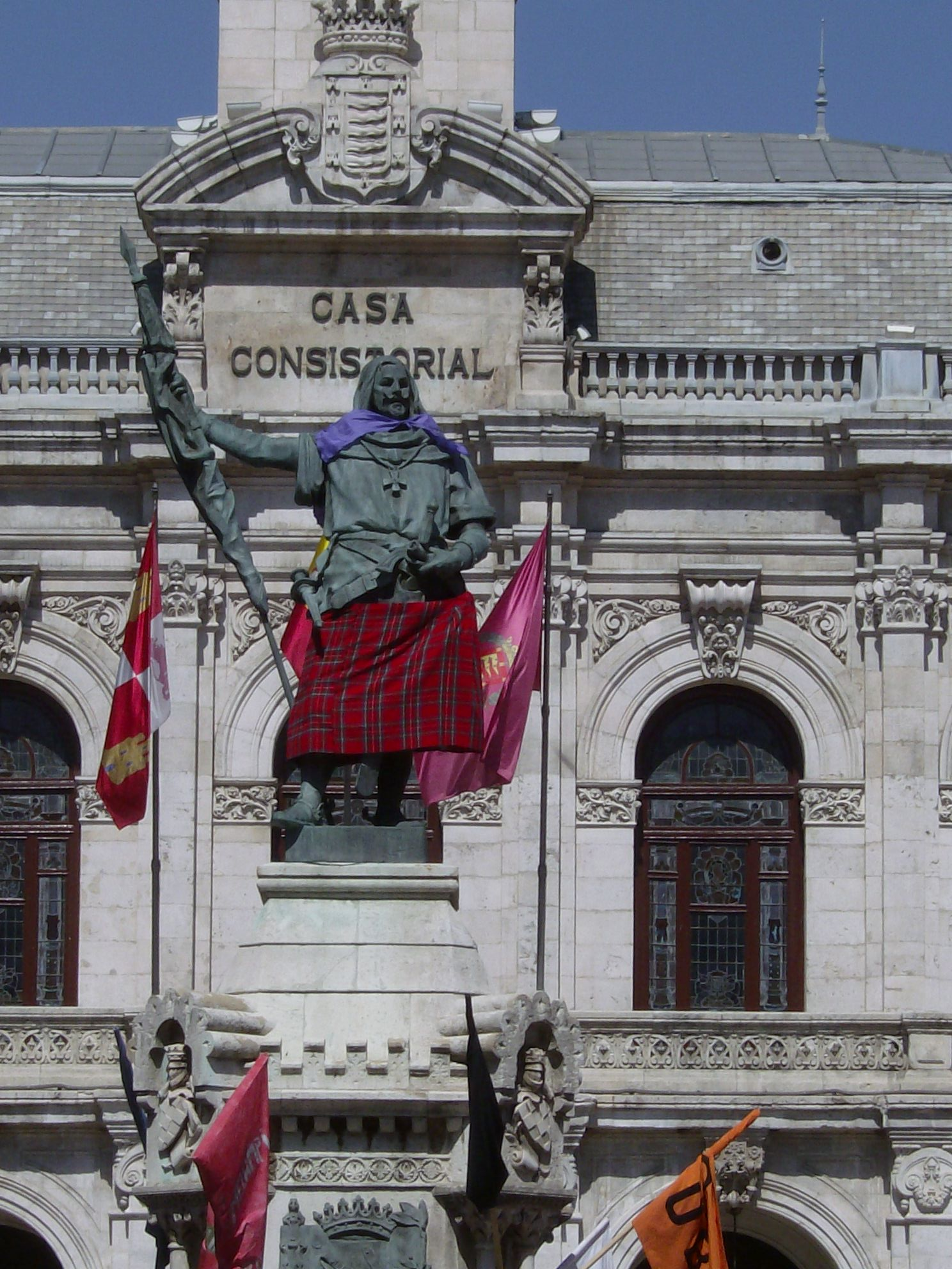 Estatuta del Conde Ansurez en la Plaza Mayor de Valladolid durante las fiestas de la virgen de San Lorenzo